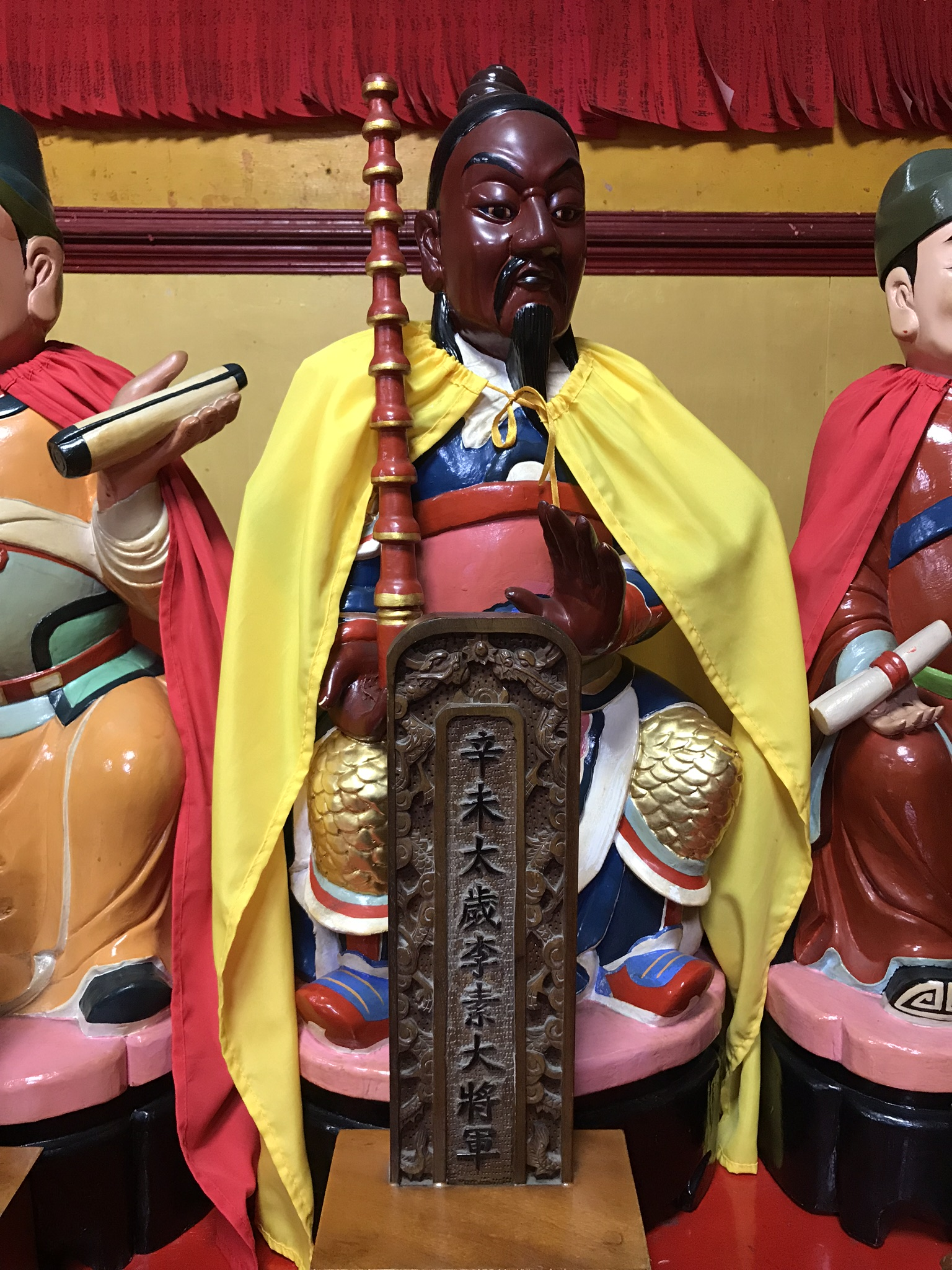 辛未太歲李素大將軍神像